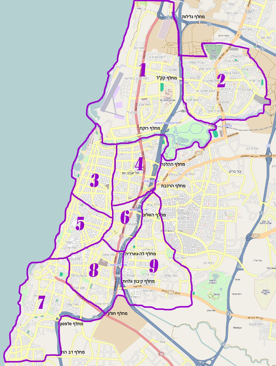 Dzielnice Tel Awiwu